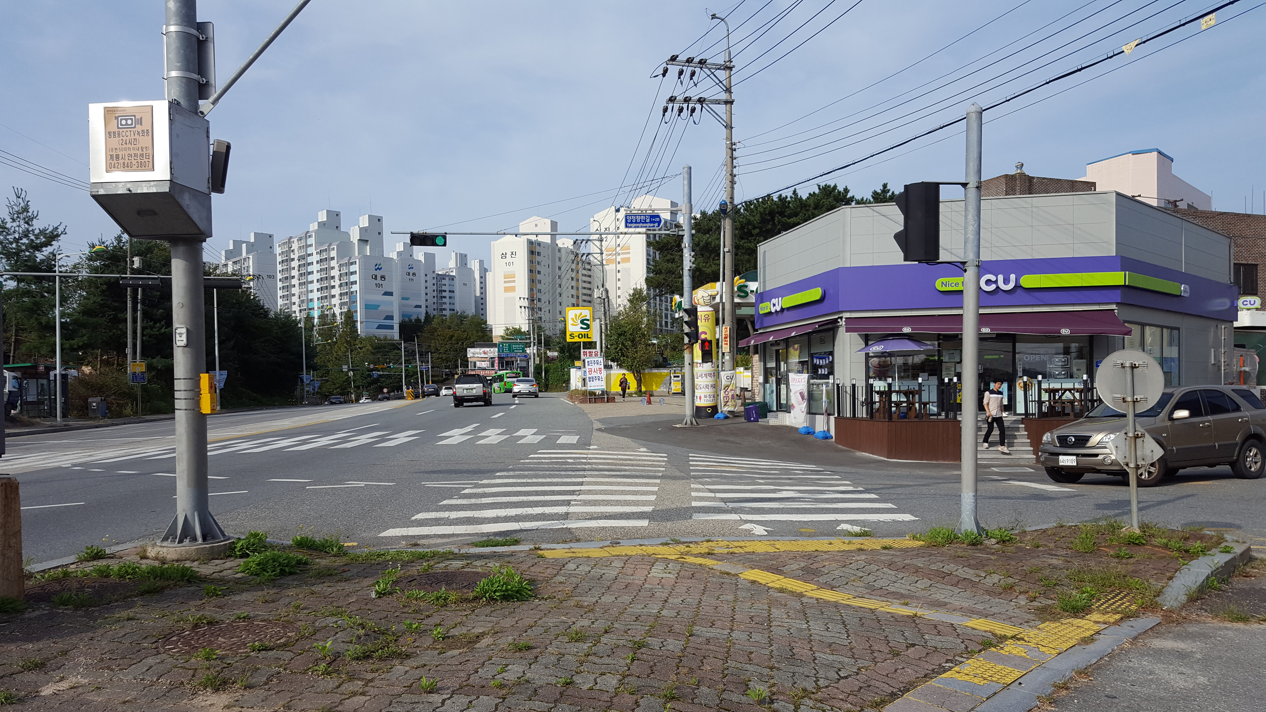 CU 계룡양정삼거리점이다. 이 곳에서 시외버스표도 판매하며 이 근처 정류장(73-280, 73-300)에서 버스가 정차한다